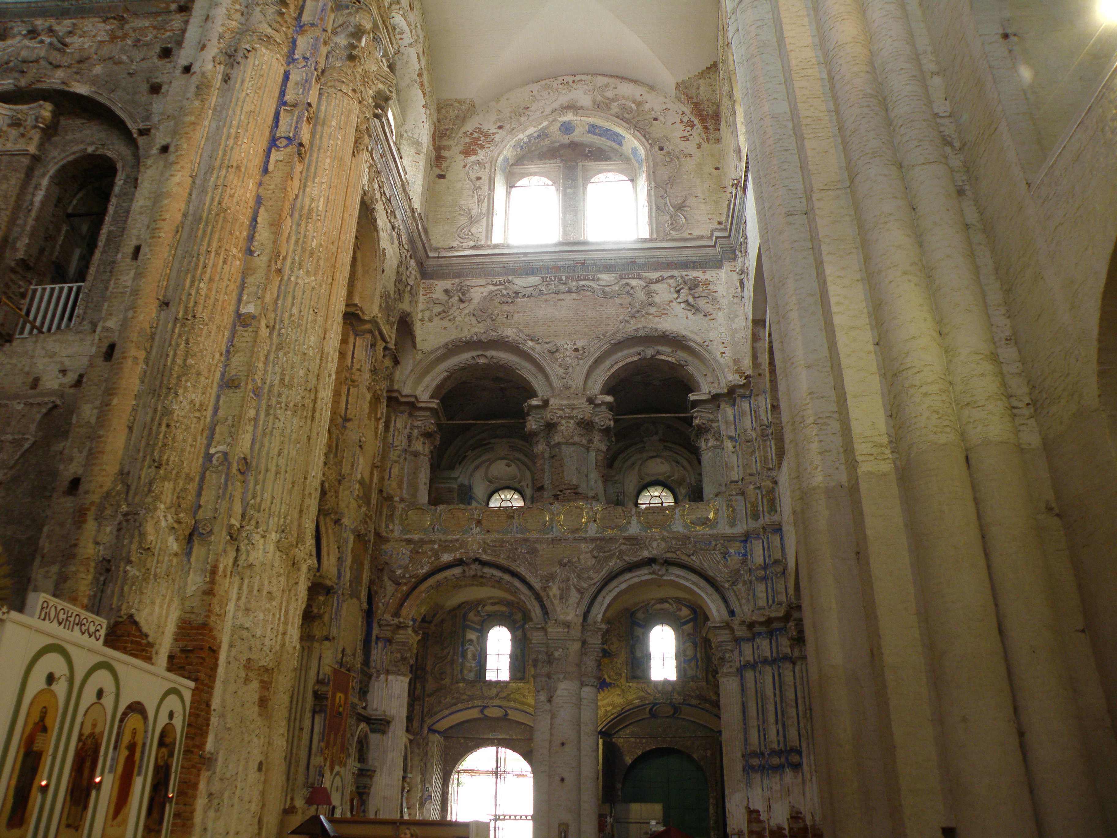 Южный вход Воскресенского собора Новоиерусалимского монастыря